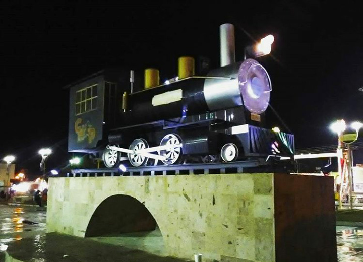 Símbolo de La Junta, Chihuahua.